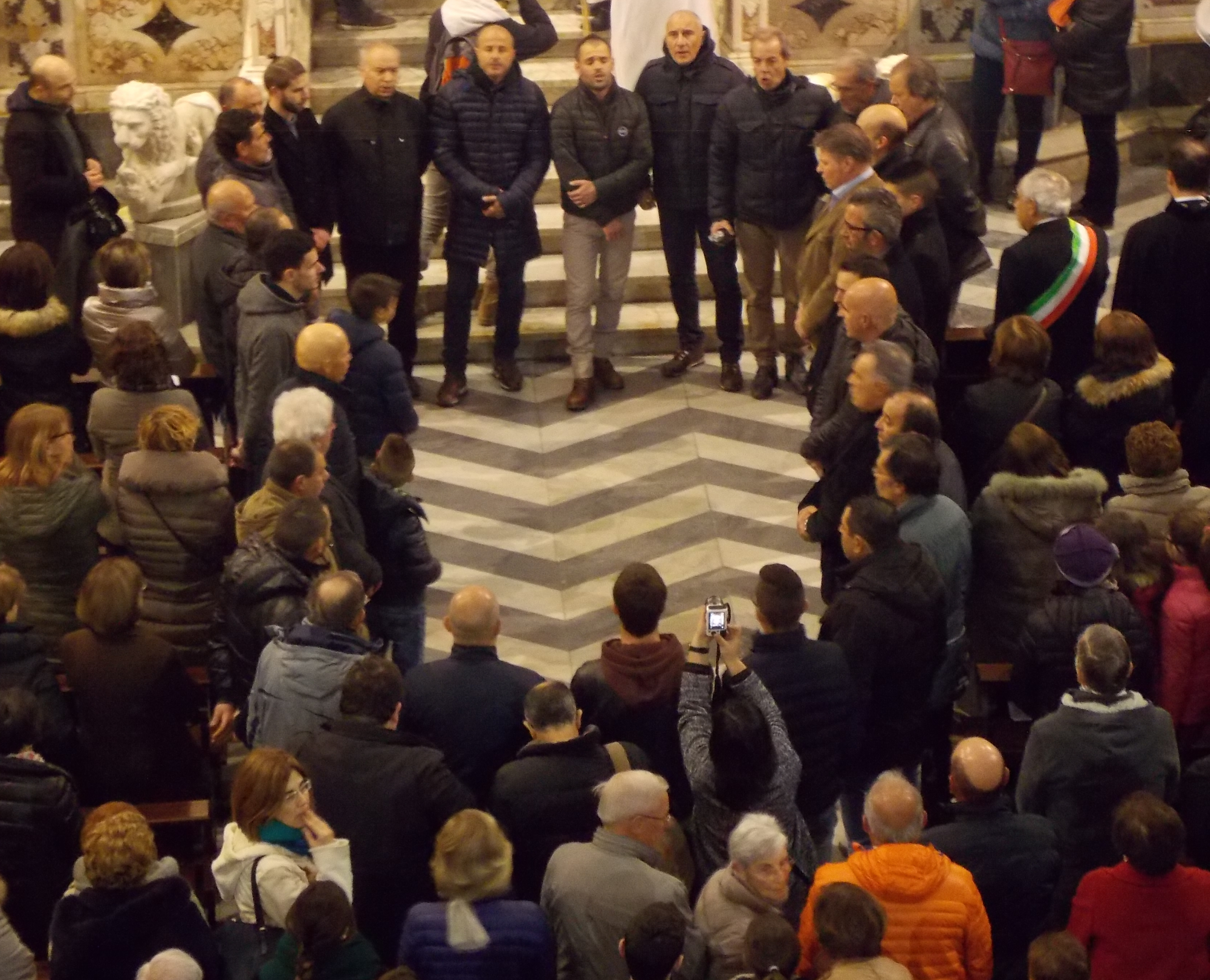 il Coro